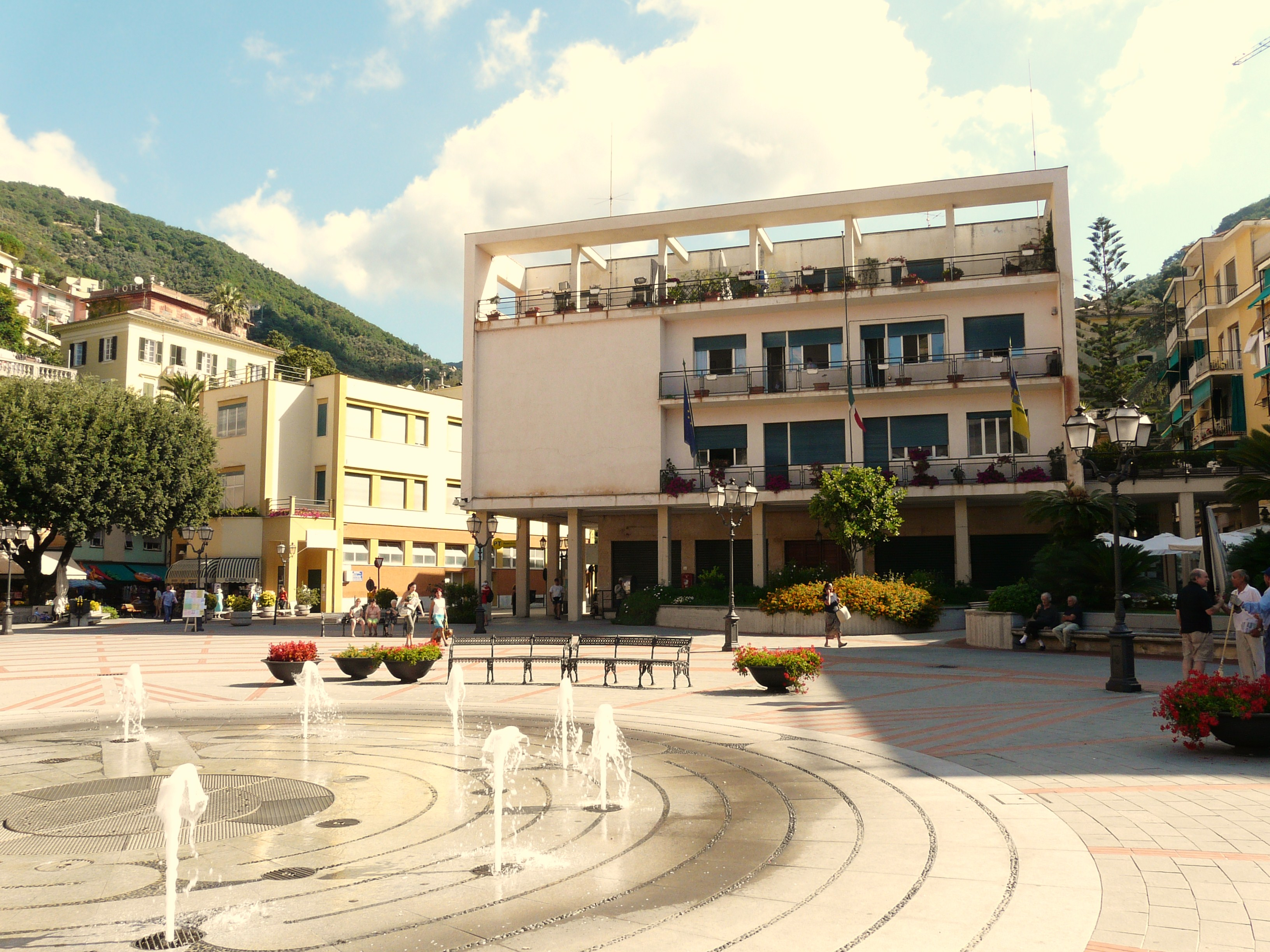 Il municipio, Zoagli, Liguria, Italia